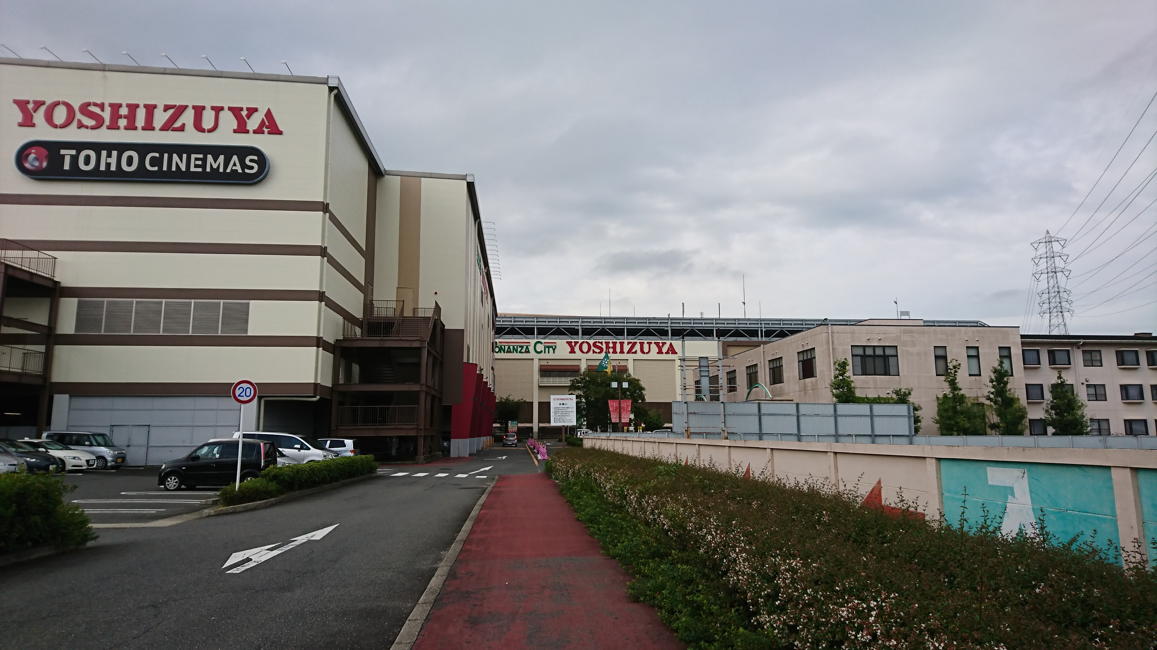 右は事務センター 左はTOHOシネマズ津島があるシネマ館 中央はヨシヅヤ津島本店